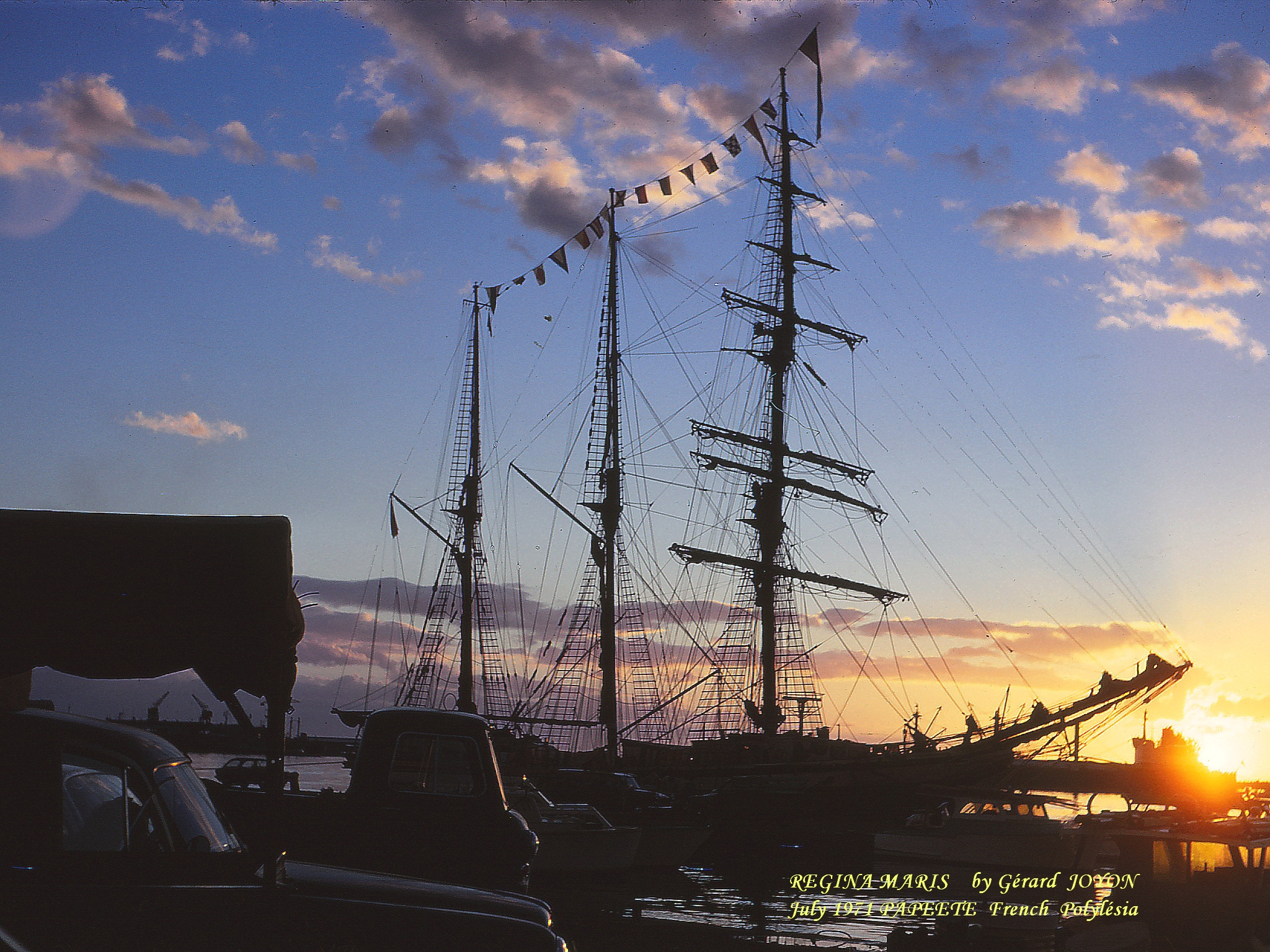 Ce voilier ne navigue plus.Il faisait, dans les années (1971) où je l'ai pris en photo des voyages dans le PACIFIQUE SUD, l' AUSTRALIE, les GAMBIERS.